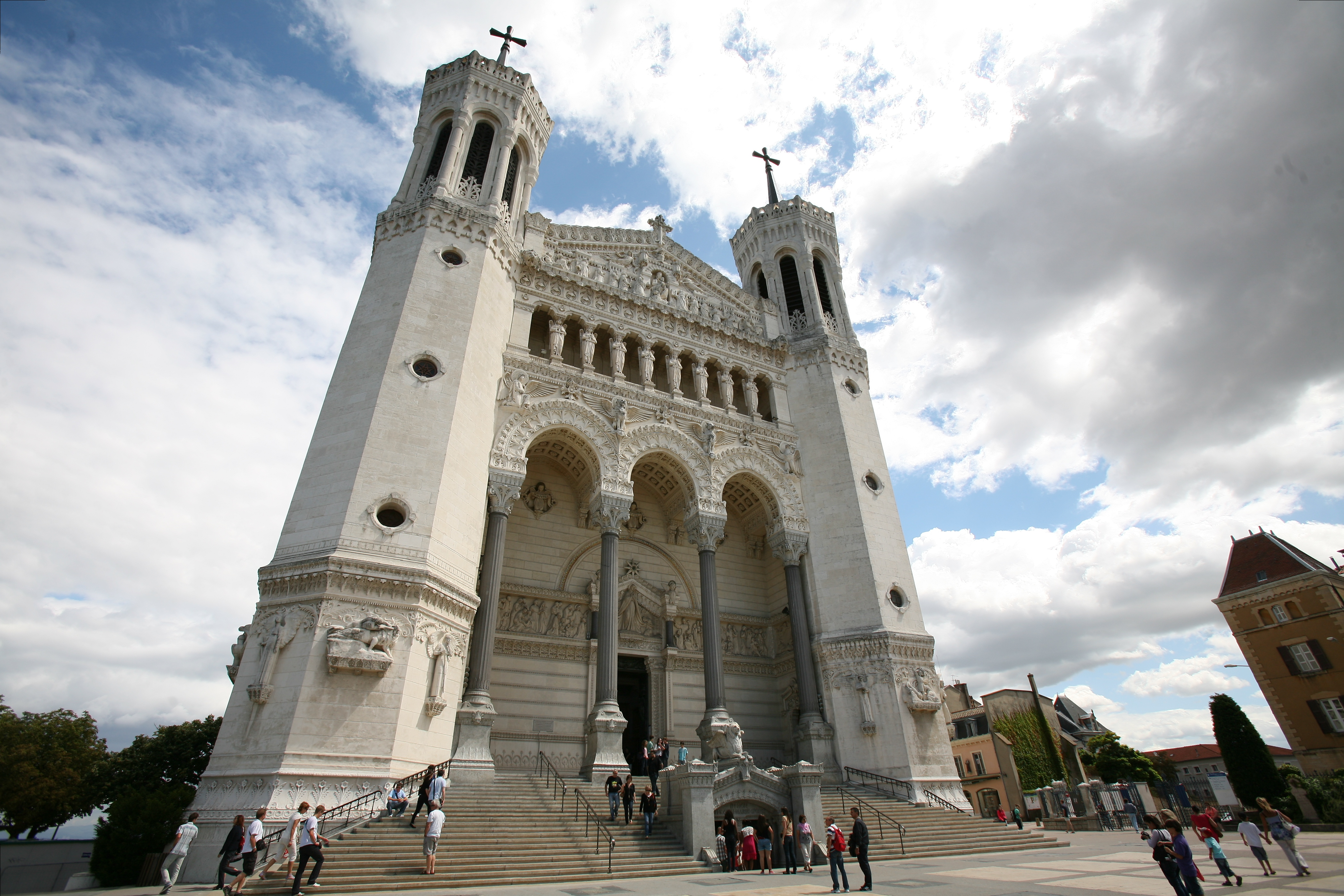 Basilique de Fourvières, Lyon, France.